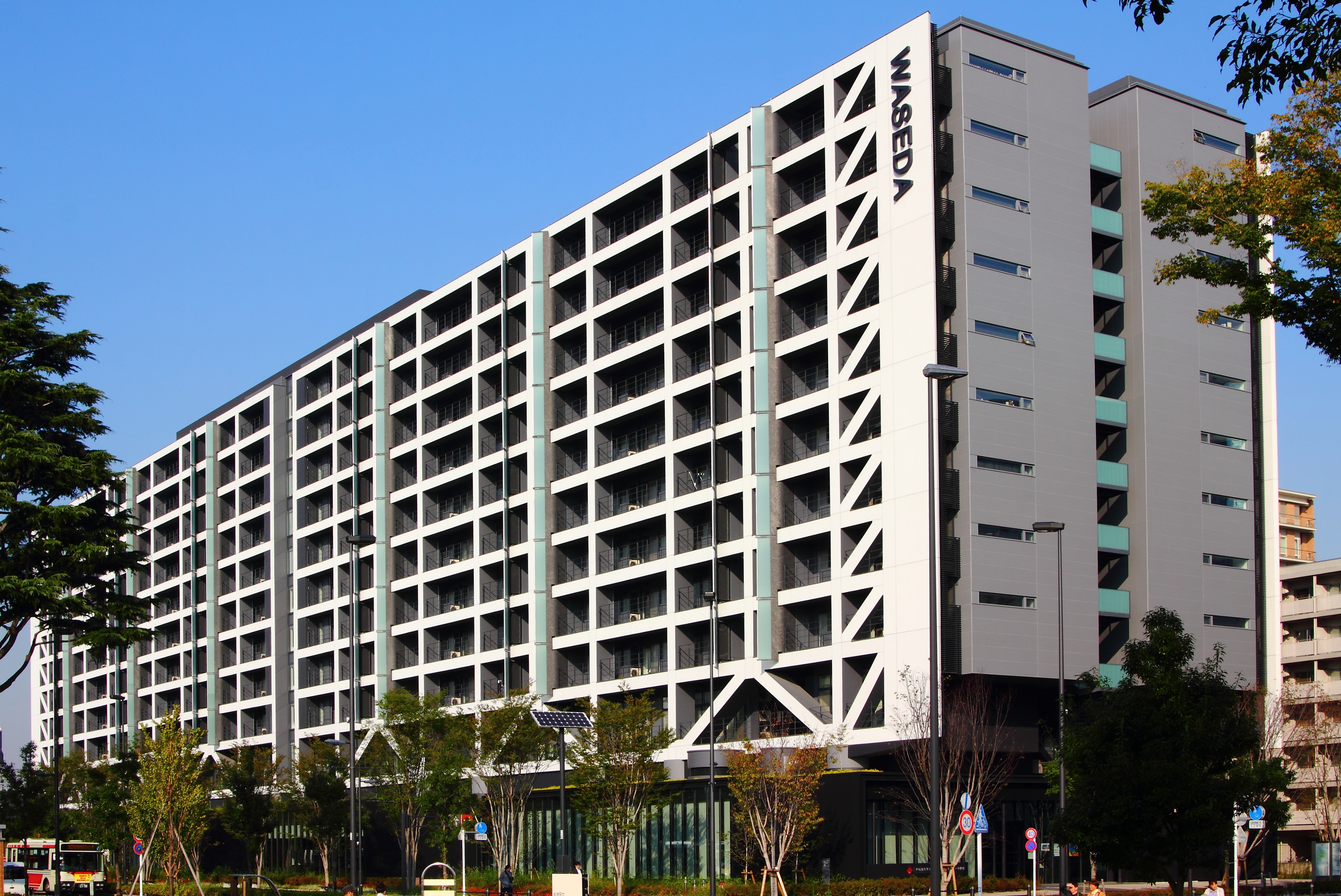 早稲田大学中野国際コミュニティプラザ(東京都中野区)